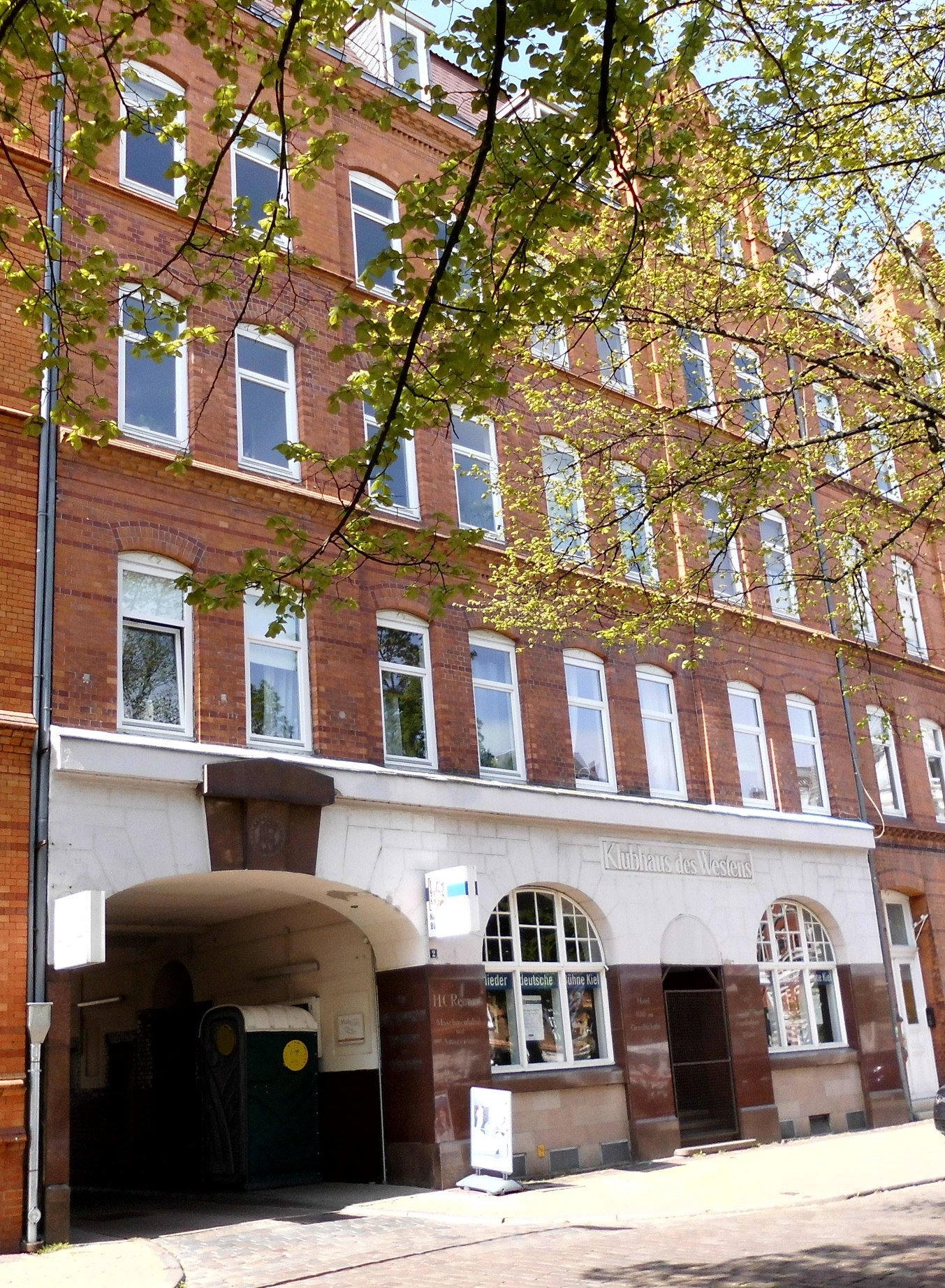 Wilhelmplatz 2 im Kieler Stadtteil Schreventeich.